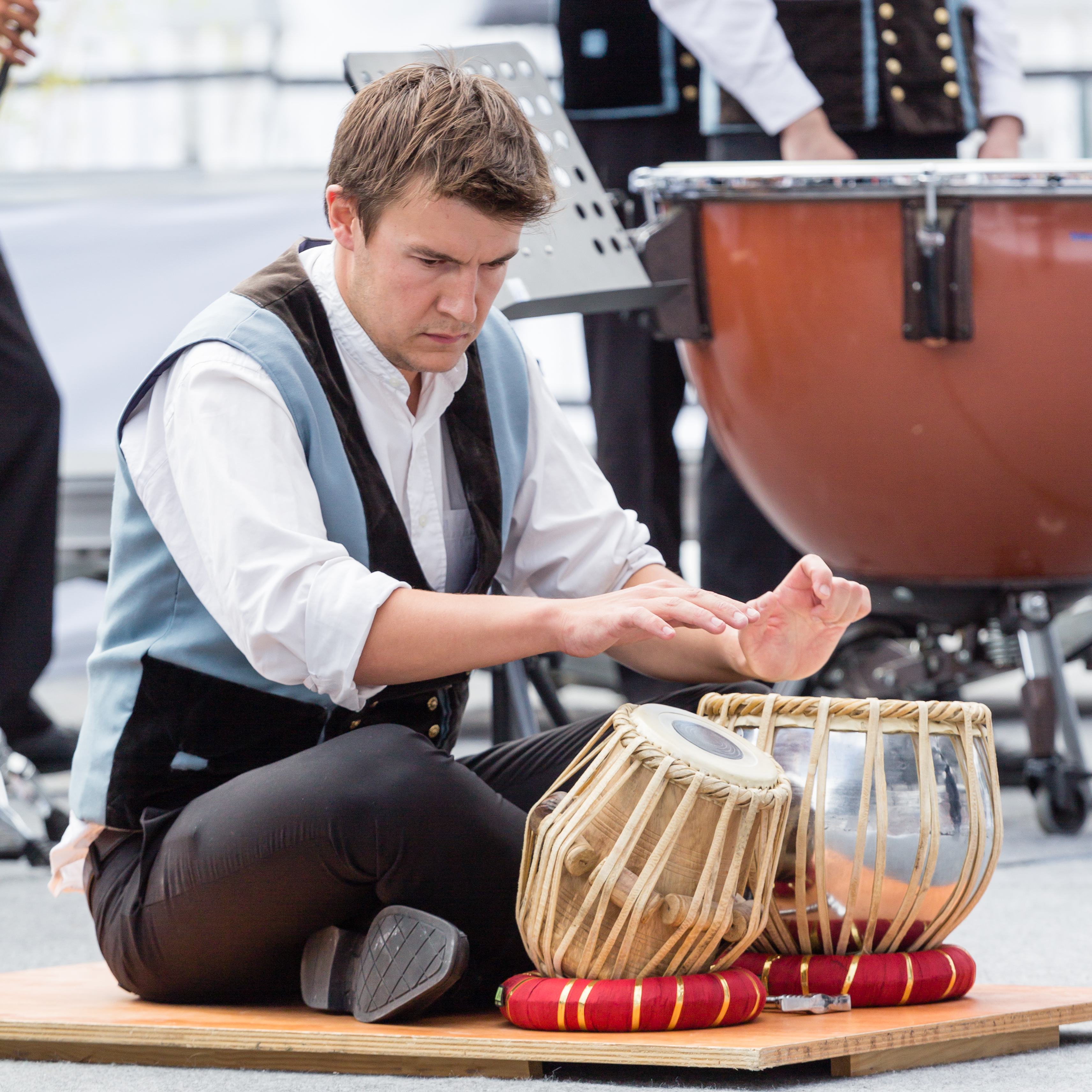 Le bagad Melinerion lors du championnat national des bagadoù (première catégorie) au FIL 2012.